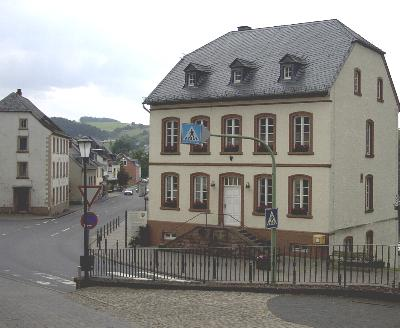 Altes Amt in Schönecken im März 2003